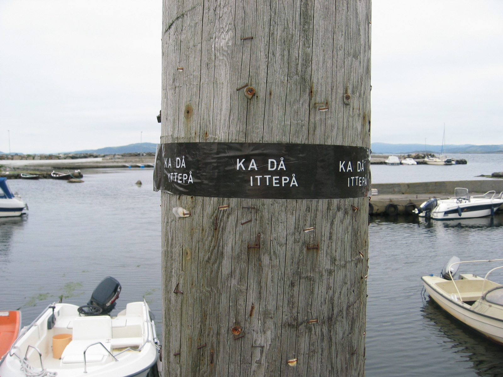 Tungenes Havn, 2007